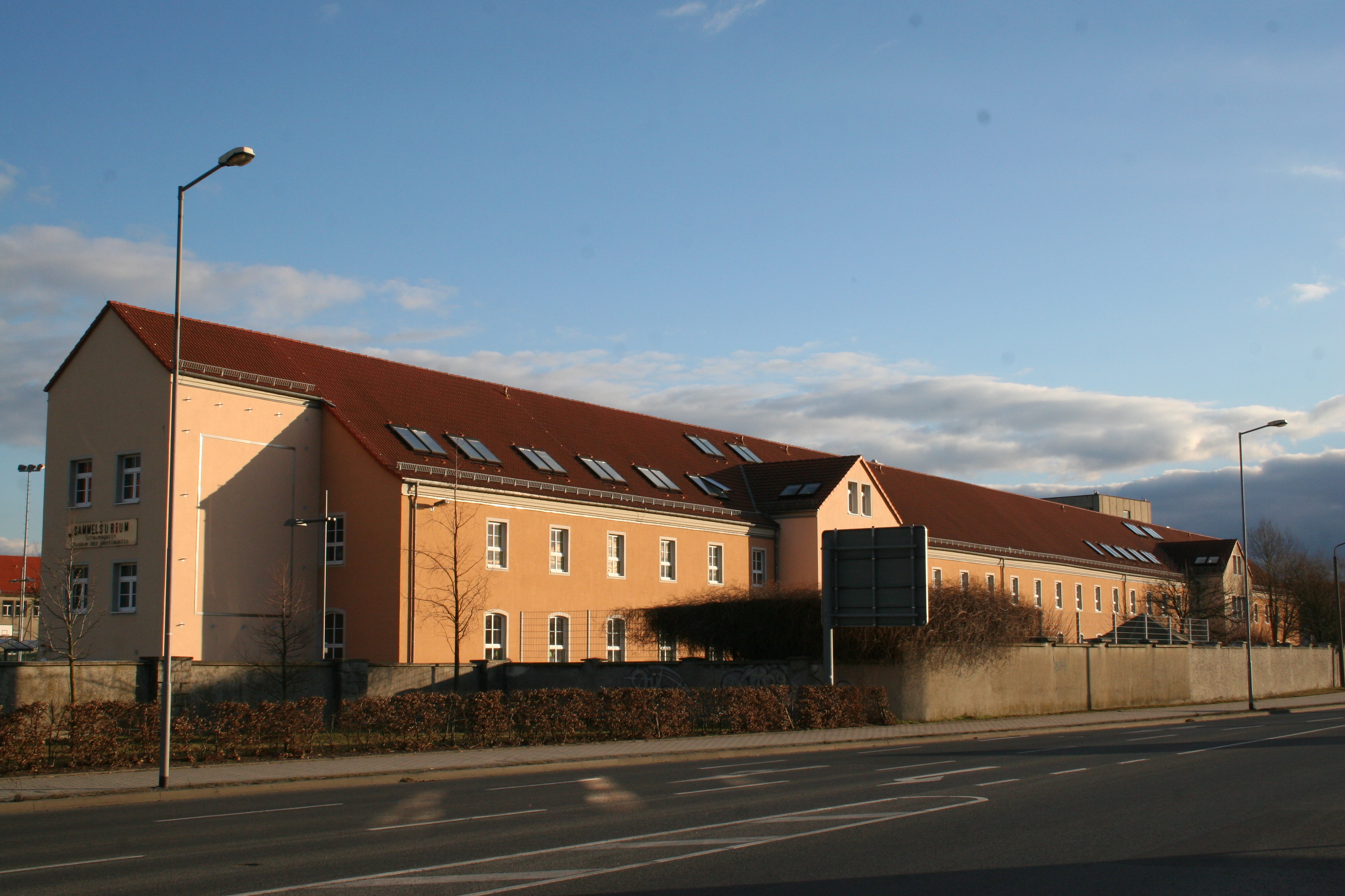 Außenansicht des Sammelsuriums des Museum der Westlausitz in Kamenz